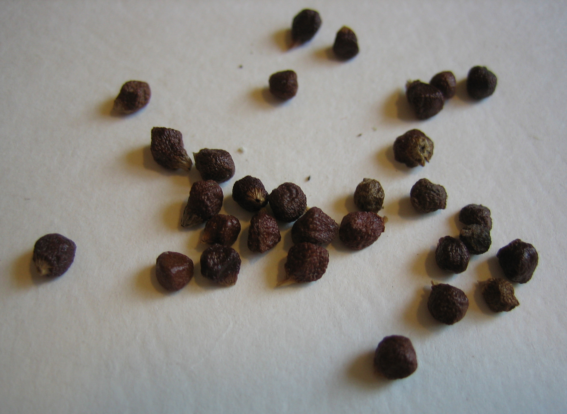 Aframomum melegueta seeds.